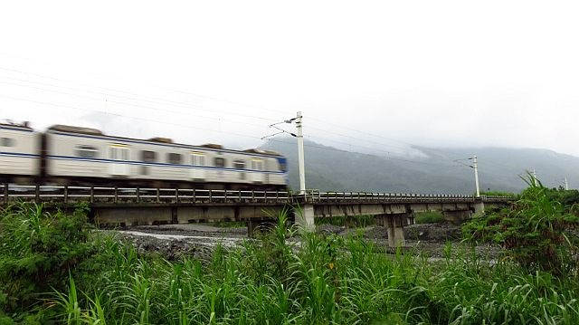 台鐵台東線關山～瑞和間跨越加鹿溪的水拔溪橋